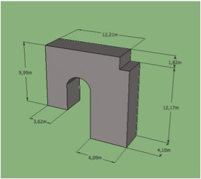 ARCHE